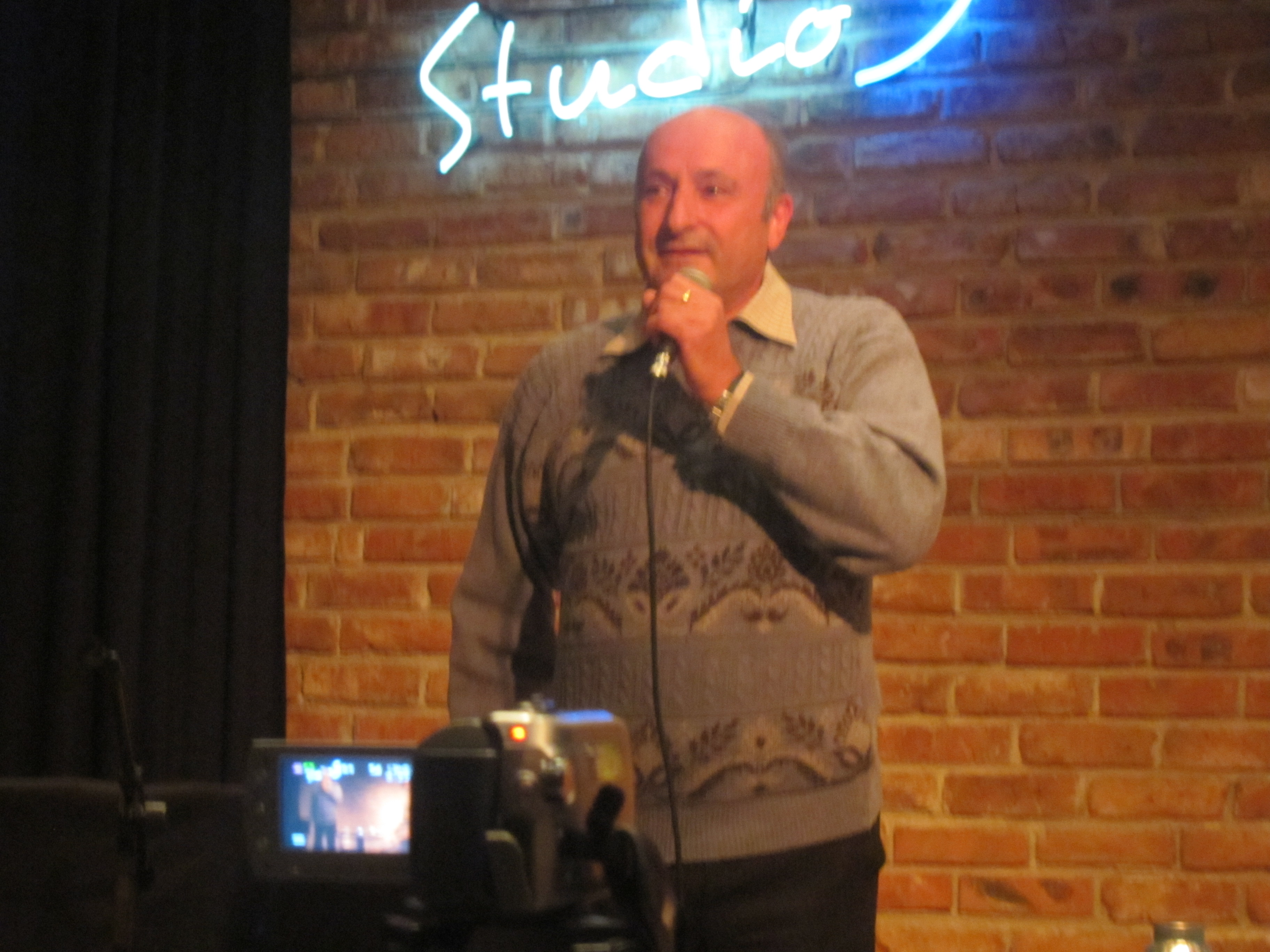 Райчо Русев